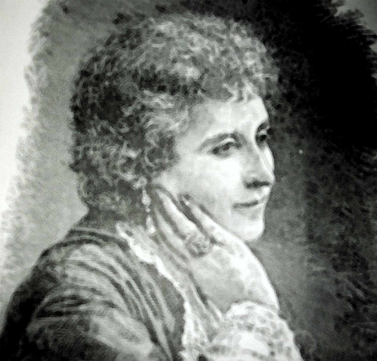 Ritratto Erminia Fuà Fusinato